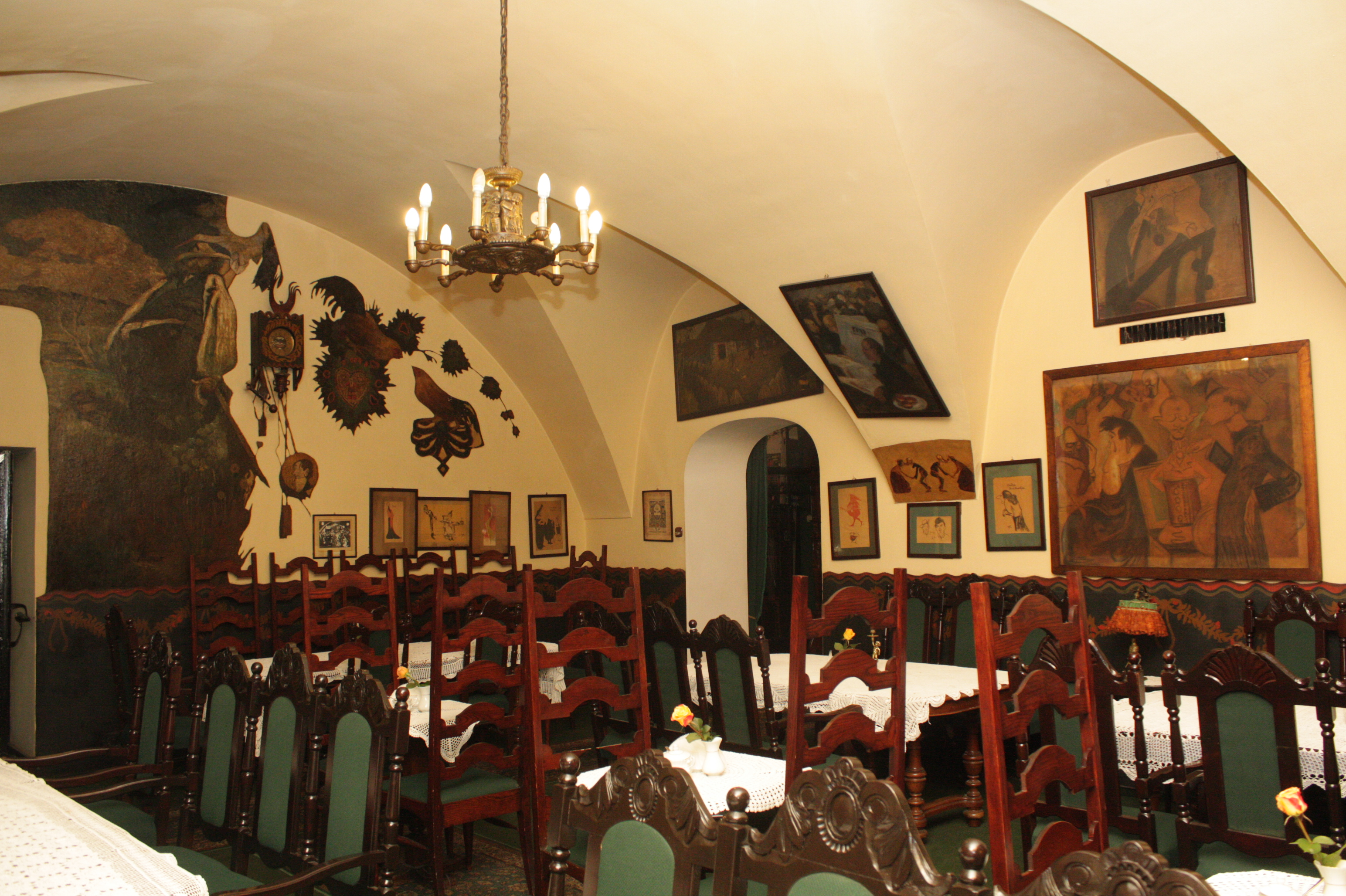 Jama Michalika - sala "Satra"